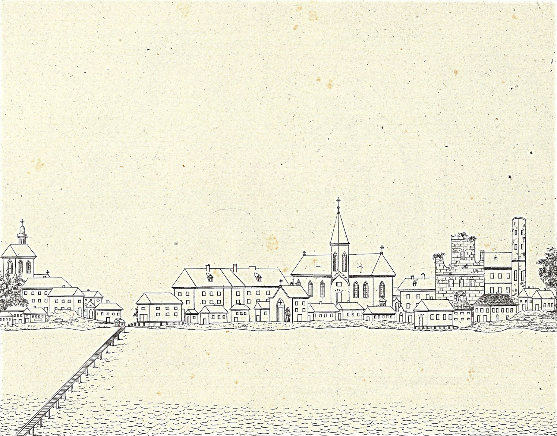 Беларуская (тарашкевіца): Берасьце (Bieraście), вуліца Пясецкая (vulica Piasieckaja).